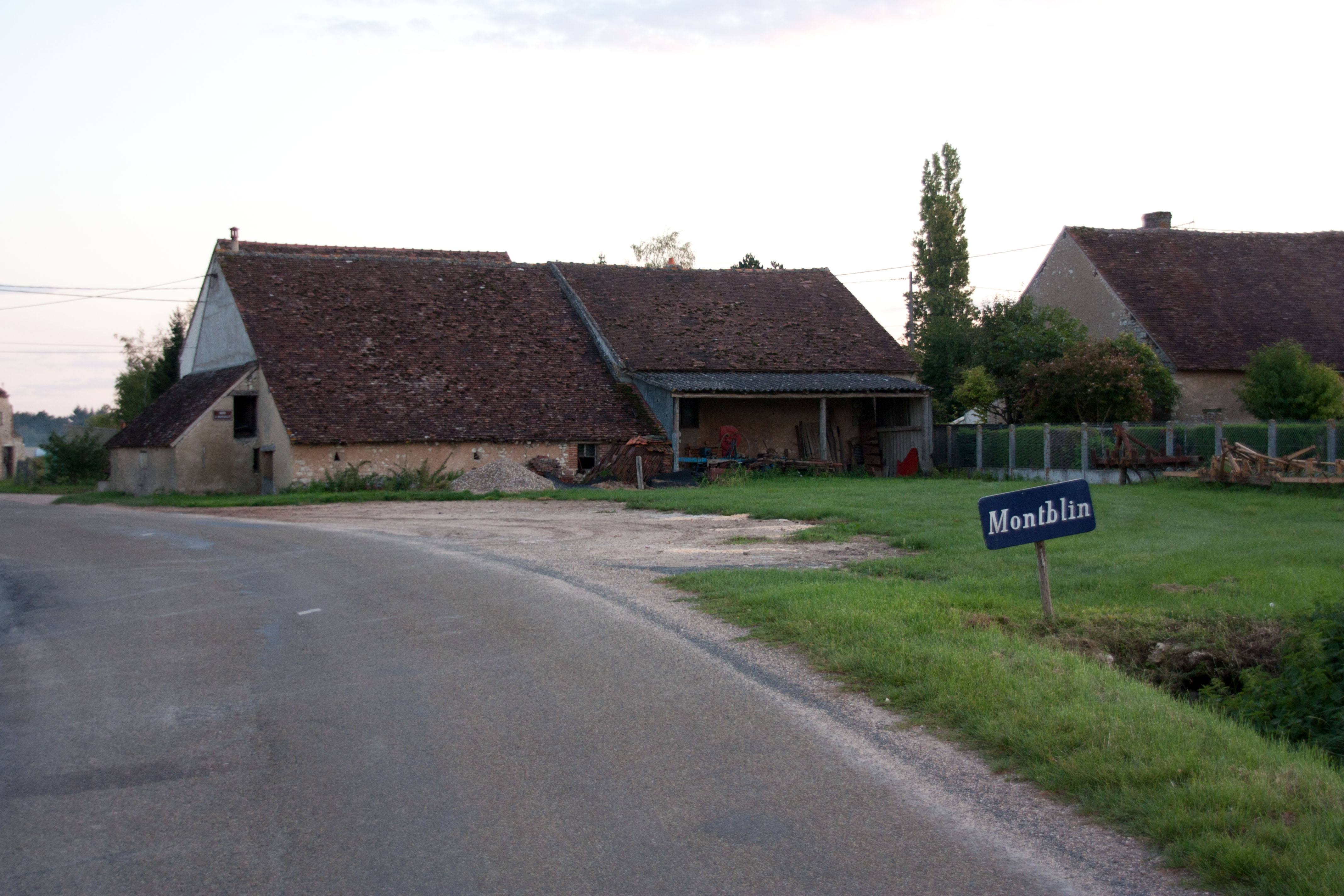 Lieu-dit Montblin, Pressigny-les-Pins, Loiret, France